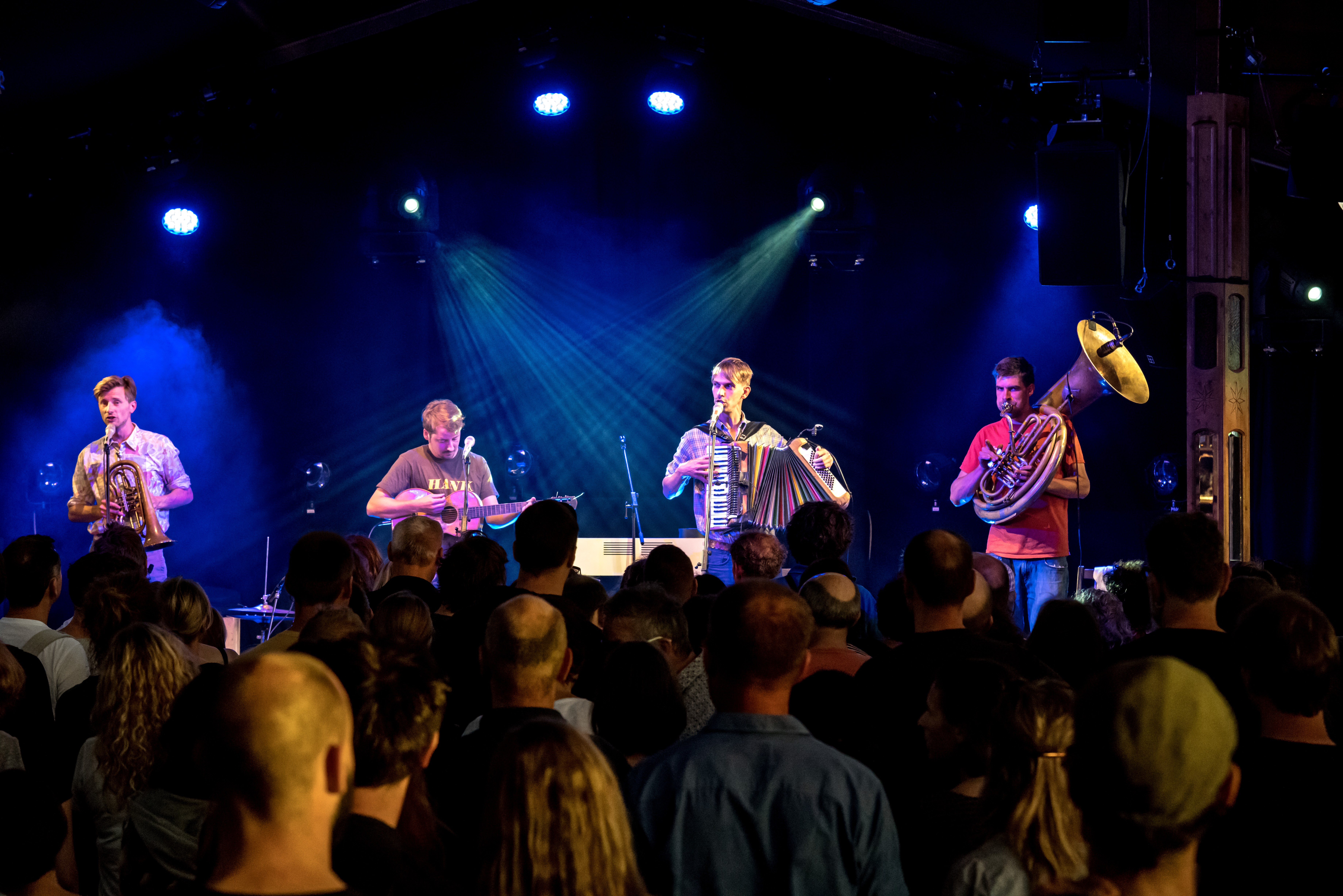 Bilder vom Zelt Musik Festival 2017 in Freiburg im Breisgau Kofelgschroa (ZMF 2017) am 14-07-2017